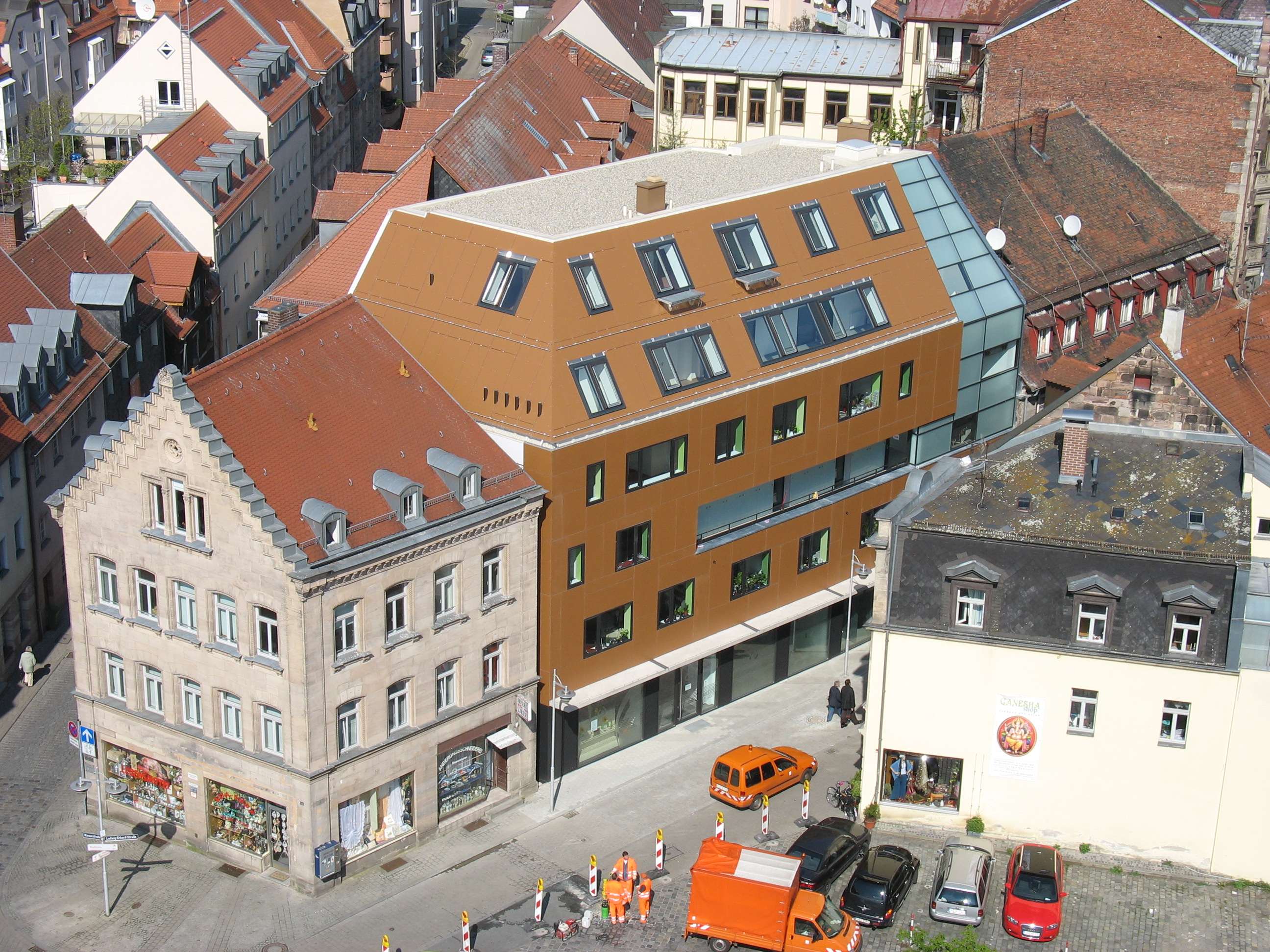 Städtebaulich markantes Baudenkmal Fürth Ludwig-Erhard -Straße 13 (mit Treppengiebel) links im Vordergrund (Baujahr 1844) in Fürth. Umstrittener Neubau Ludwig-Erhard Straße 15/17 (Fertigstellung 2008) rechts daneben. 800 Protestunterschriften gegen das Gebäude (Argument u.a.: Missachtung städtebaulicher Denkmalpflege). Erscheinungsbild später durch Feuerleitern/Dachausstiege etc. später noch weiter verschlechtert. Foto vom Rathausturm. Siehe u.a.: Volker Dittmar: Rote Karte für modernen Neubau. In: Fürther Nachrichten vom 1. November 2006 (Online); Volker Dittmar: Andere Sicht aufs Haus. In: Fürther Nachrichten vom 17. November 2006 (Online); „Beton-benebelte Bau-Banausen?“ (Blogdiskussion); Alexander Mayer: Rundbrief des Stadtheimatpflegers Nr. 15 v. 18. Januar 2007, S. 5 f. Online-PDF